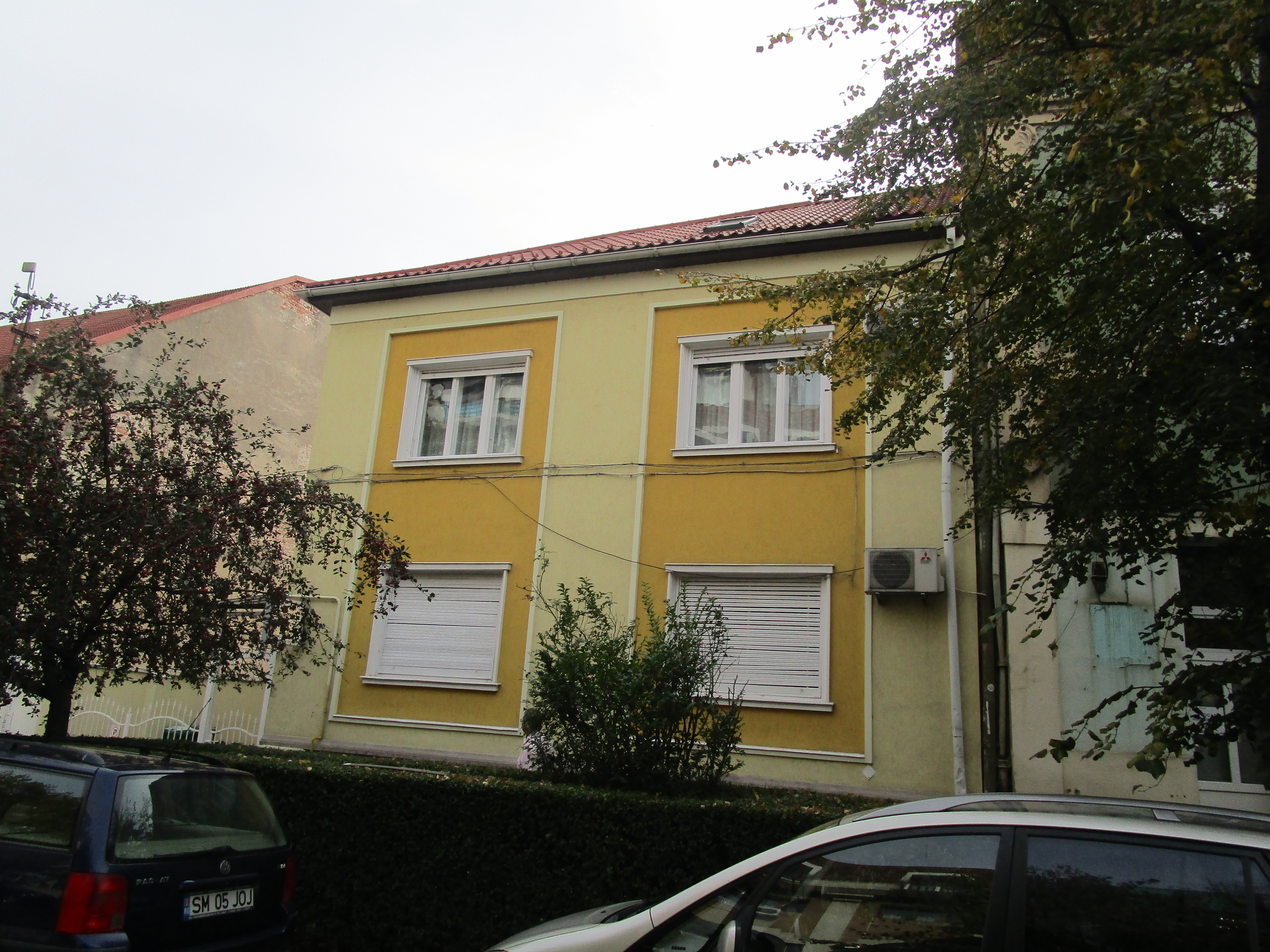 Ansamblul urban „Strada Mihai Viteazul”